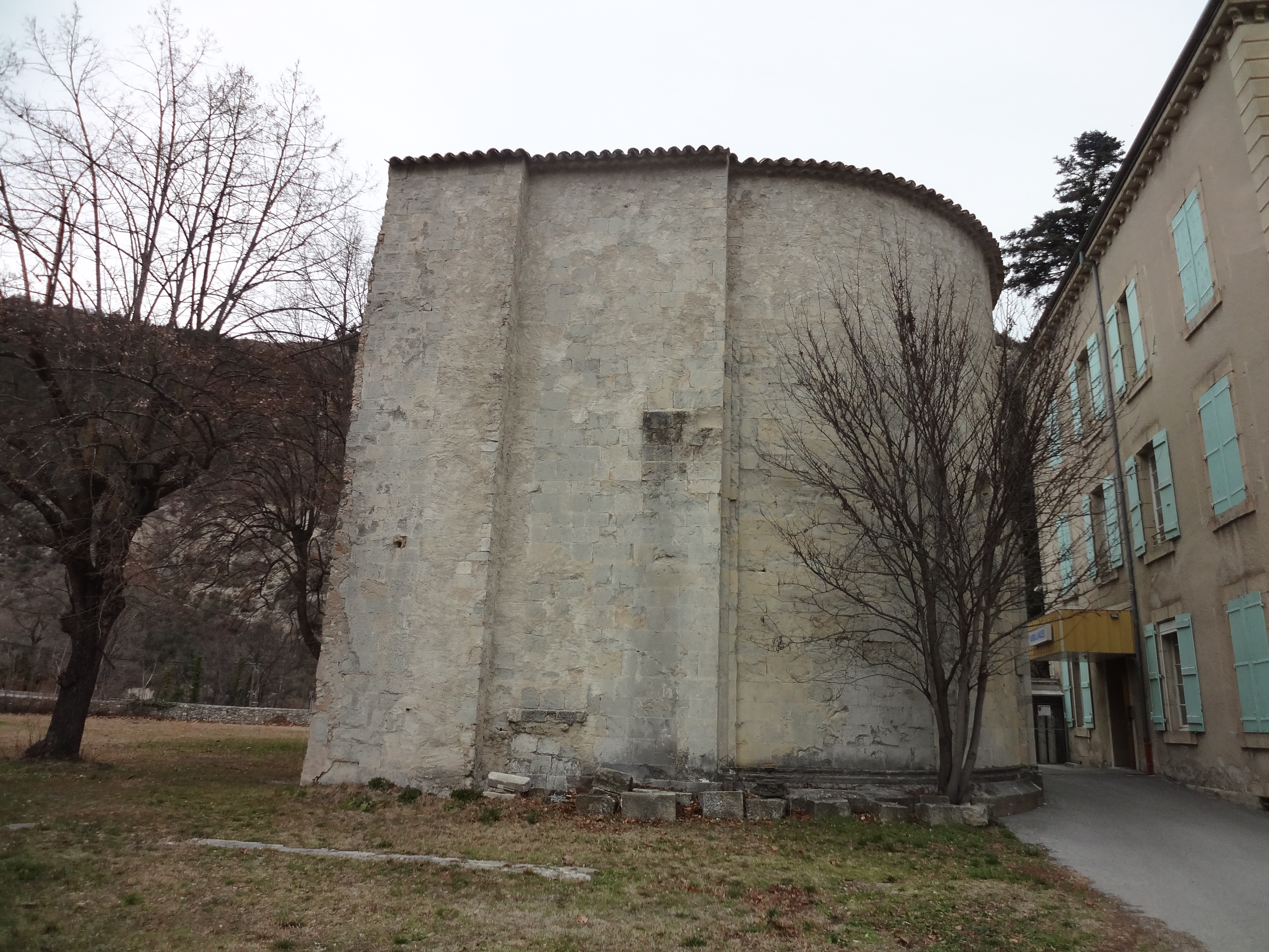 Chevet de l’ancienne cathédrale Notre-Dame-de-la-Seds à Glandèves, à Entrevaux